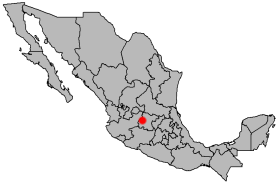 Locatie van León de los Aldamas